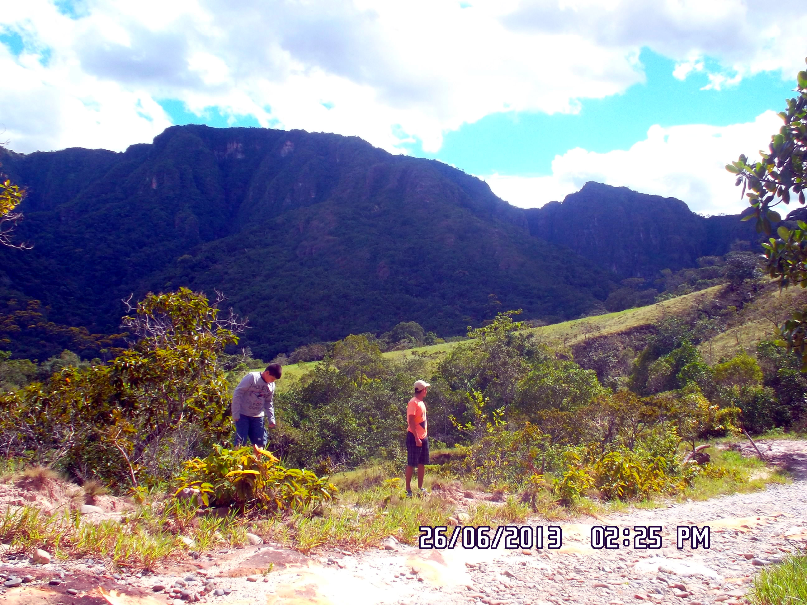 Indio Acostado en la Macarena norte.